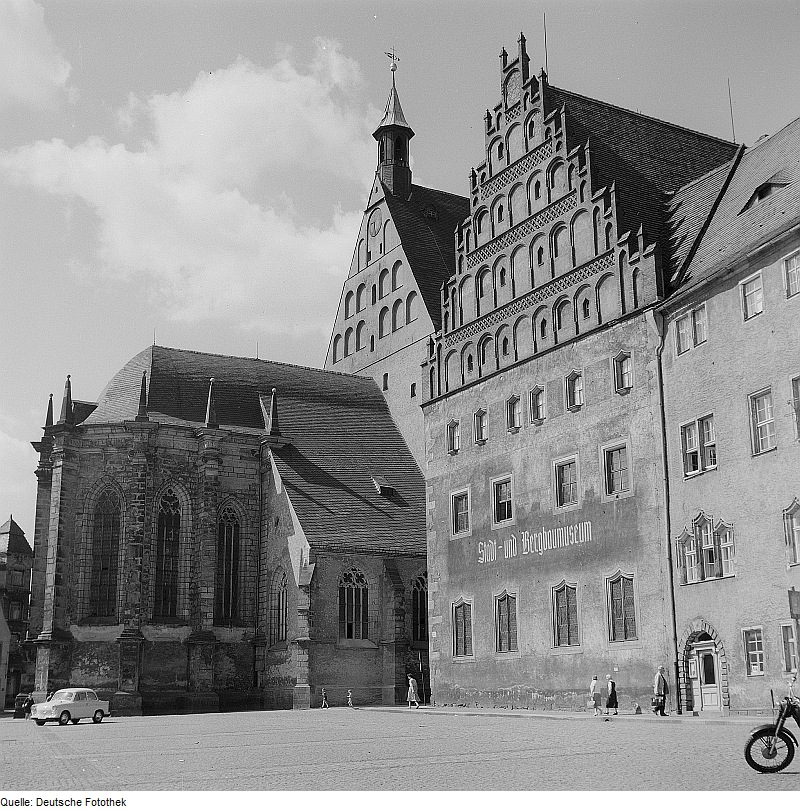 Original image description from the Deutsche Fotothek Freiberg. Stadt- und Bergbaumuseum und Dom